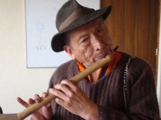 indi